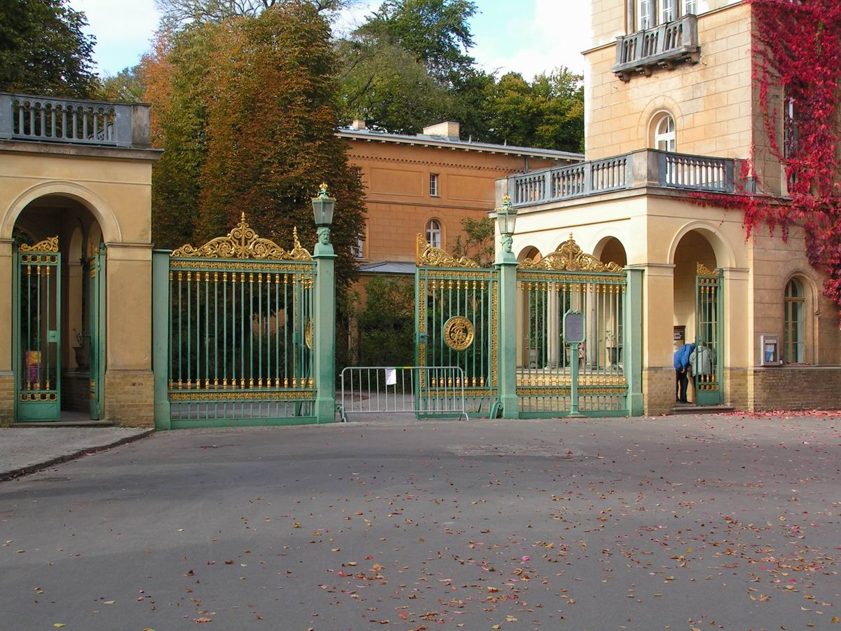 Potsdam, Grünes Gitter, Eingang zum Park Sanssouci Fotografiert von Dieter Brügmann am 18.10.2005.